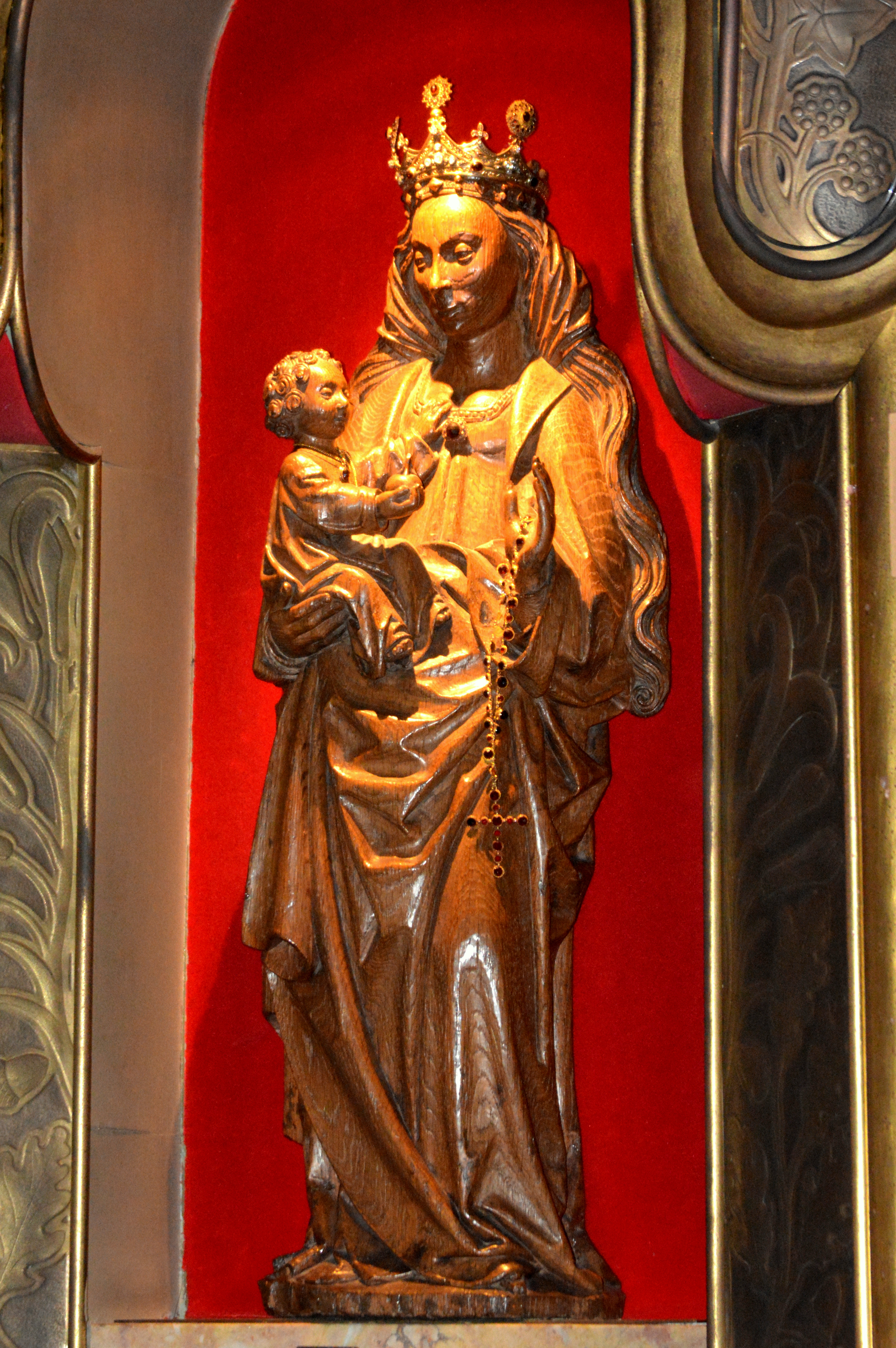 Dominikustsjerke, Ljouwert, Us Leaffrou fan Ljouwert (likernôch 1506)